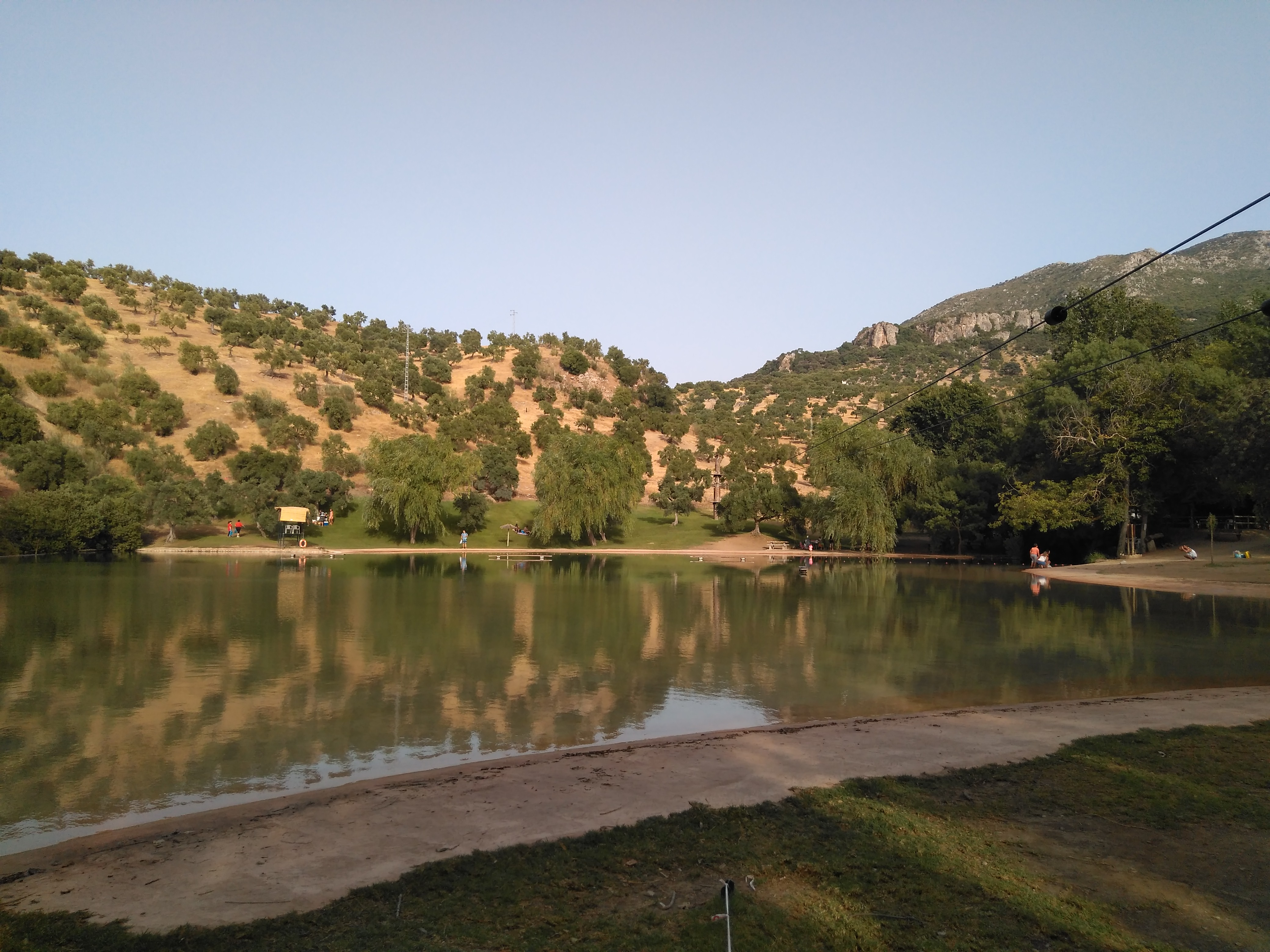 Área Recreativa Municipal La Playita en Arroyomolinos (Zahara de la Sierra, España)